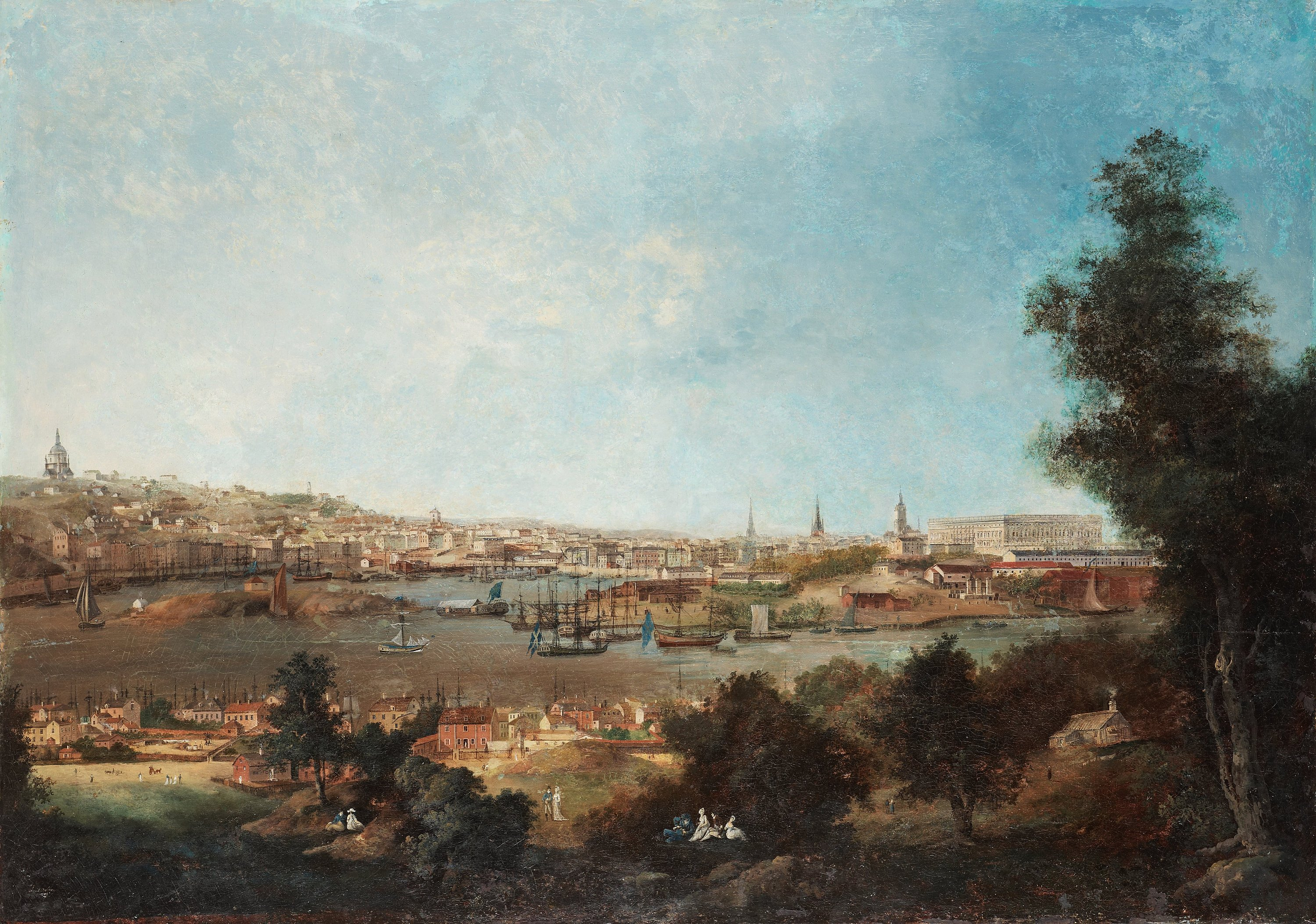 Stockholm sett från Djurgården, målad av Louis Belanger 1808